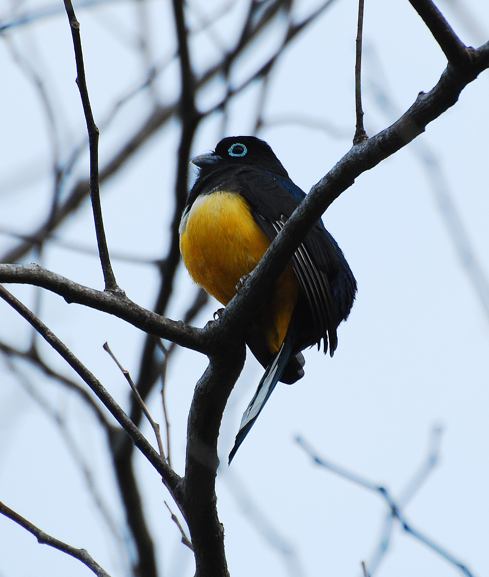 Black-headed Trogon at La Ensenada, Costa Rica, 080222. Trogon melanocephalus.